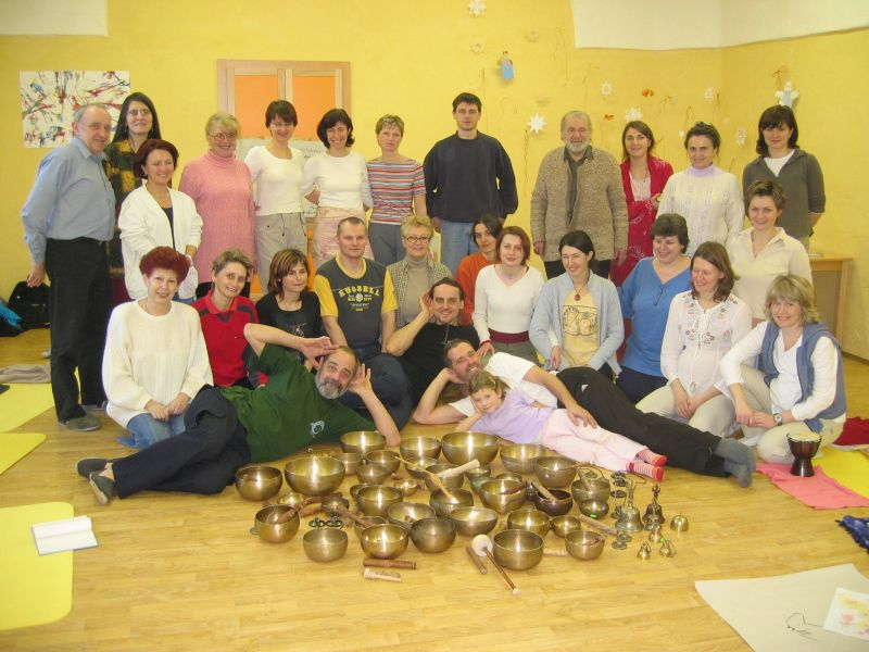 Klatovy